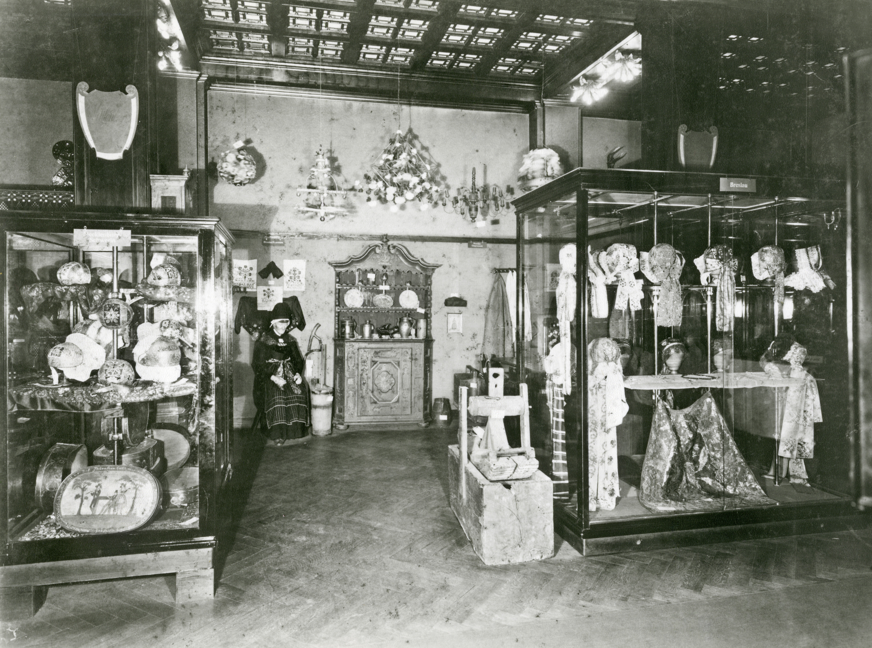 Im Palais Creutz in der Klosterstr. 36 hatte erst das „Komitee zur Gründung eines Museums für deutsche Volkstrachten und Erzeugnisse des Hausgewerbes“ einen größeren und sechs kleinere Räume zur Verfügung, später das „Museum für deutsche Volkstrachten und Erzeugnisse des Hausgewerbes“ das gesamte Erdgeschoss. 1904 wurde das Museum als Königliche Sammlung für Deutsche Volkskunde Teil der Königlich Preußischen Museen zu Berlin und behielt das Palais Creutz als sein Gebäude. Die Aufnahme zeigt eine Ausstellungsansicht um 1910. GLAM-on-Tour: Wiki goes MEK! 2.0 Wikipedianer fotografierten vom 16. bis 18. November 2018 im Museum Europäischer Kulturen. This photo was taken during a project supported by WMDE. Gefördert von / Supported by: Wikimedia Deutschland, Museum Europäischer Kulturen